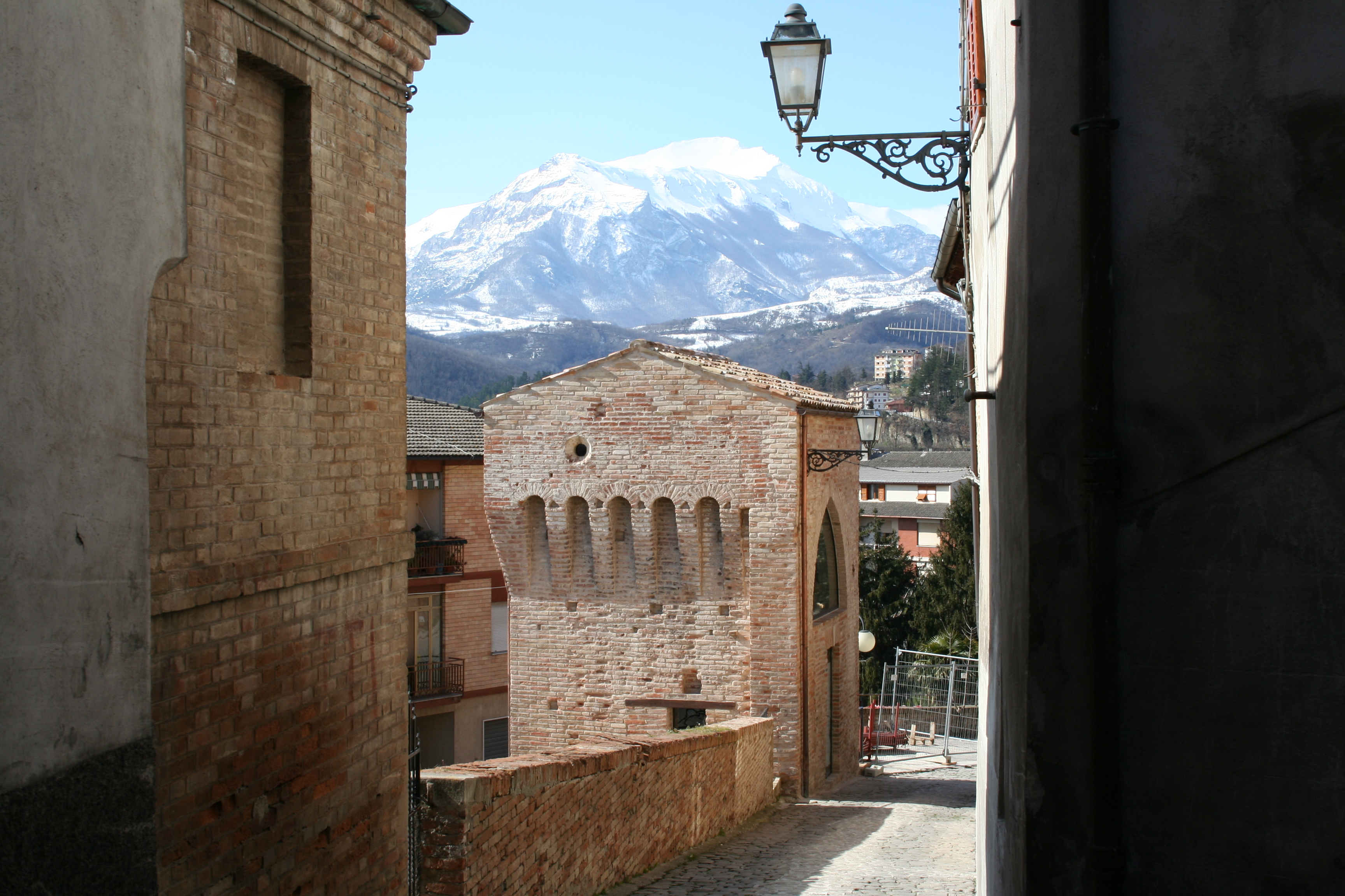 Amandola, via dello Statuto: vista del monte Priora e torrione medievale.